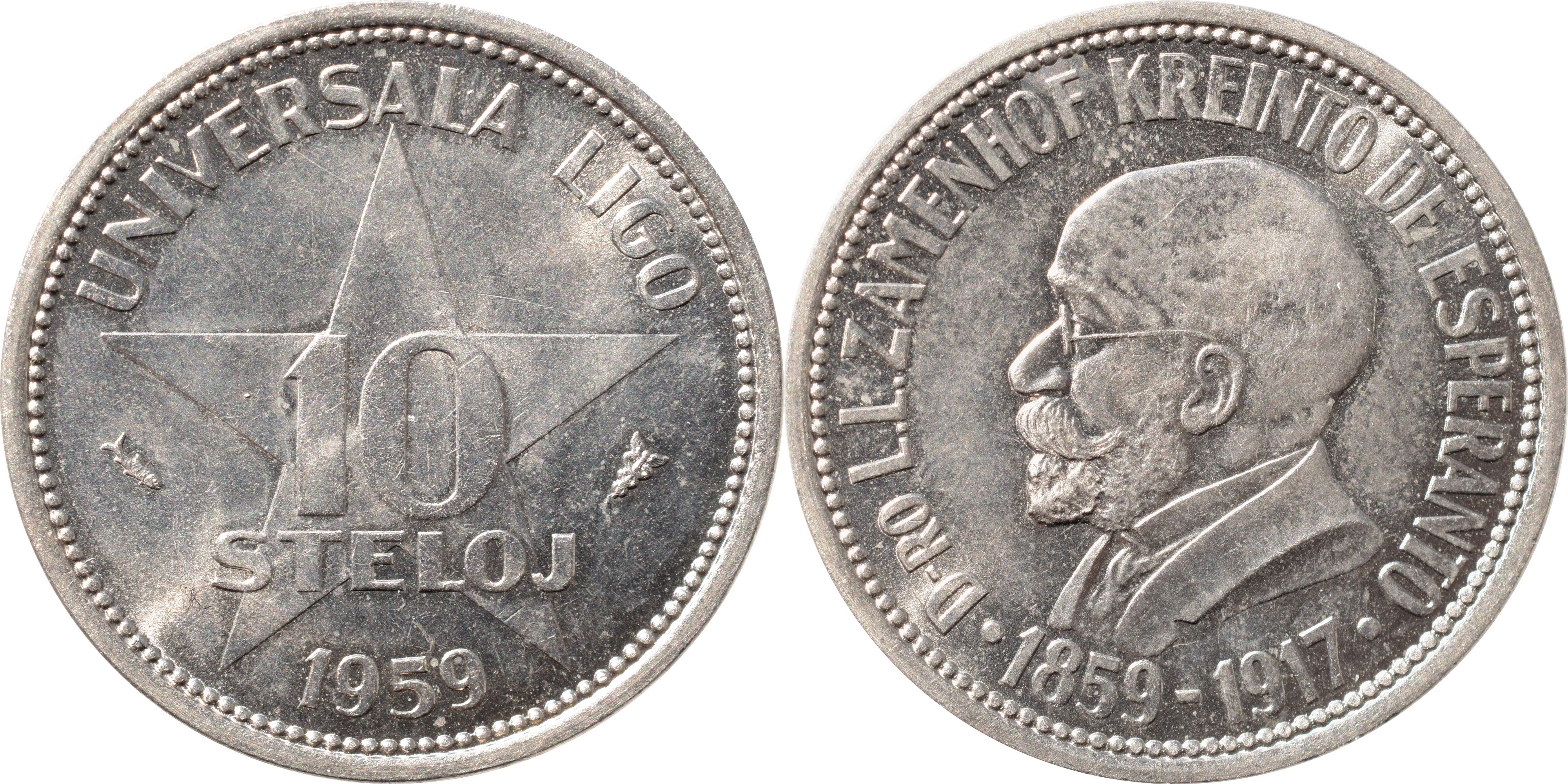 Monero de 10 steloj.